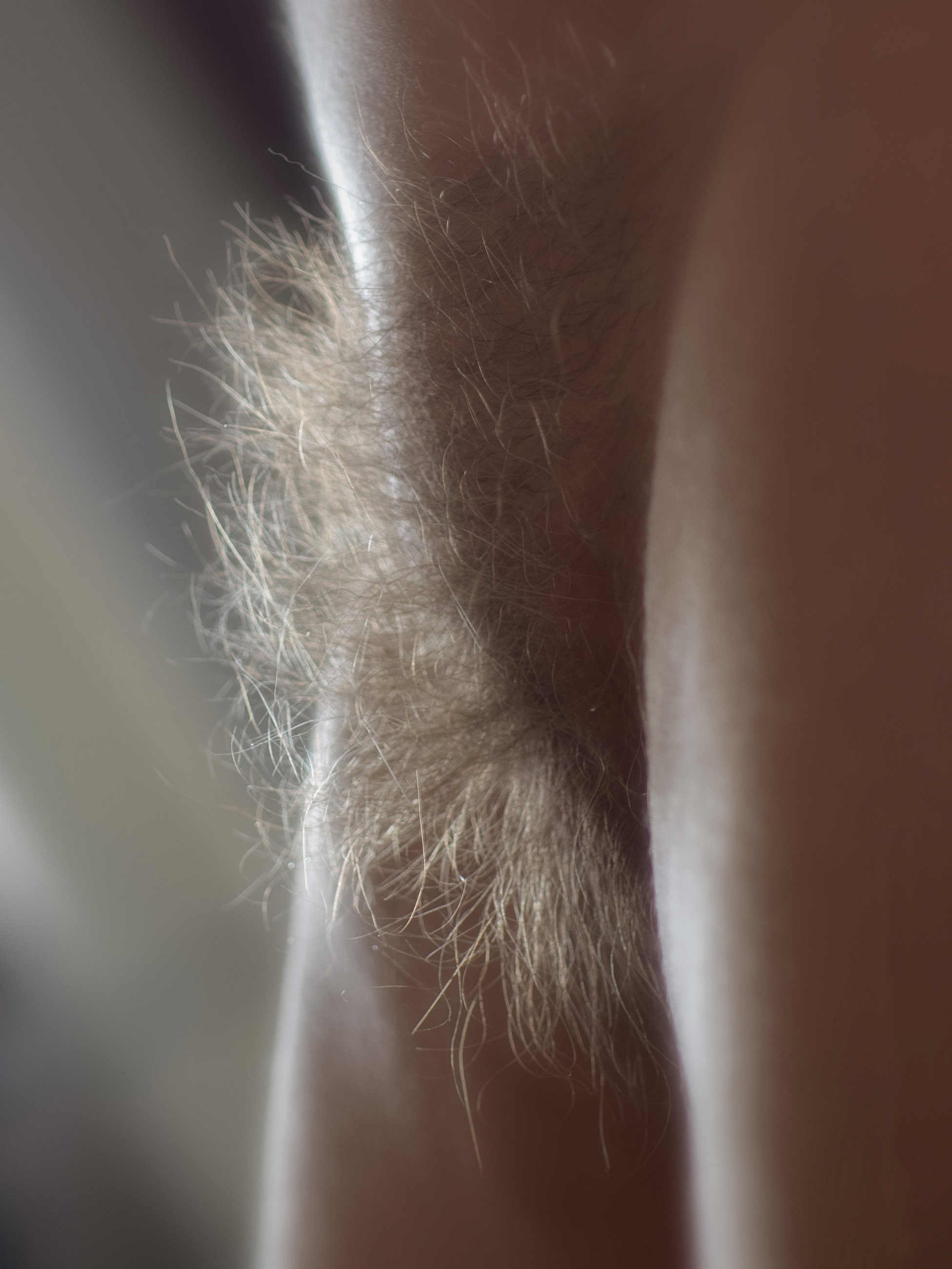 Blone Schamhaare bei einer Frau